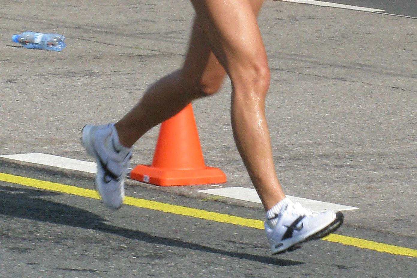 Detalle del archivo